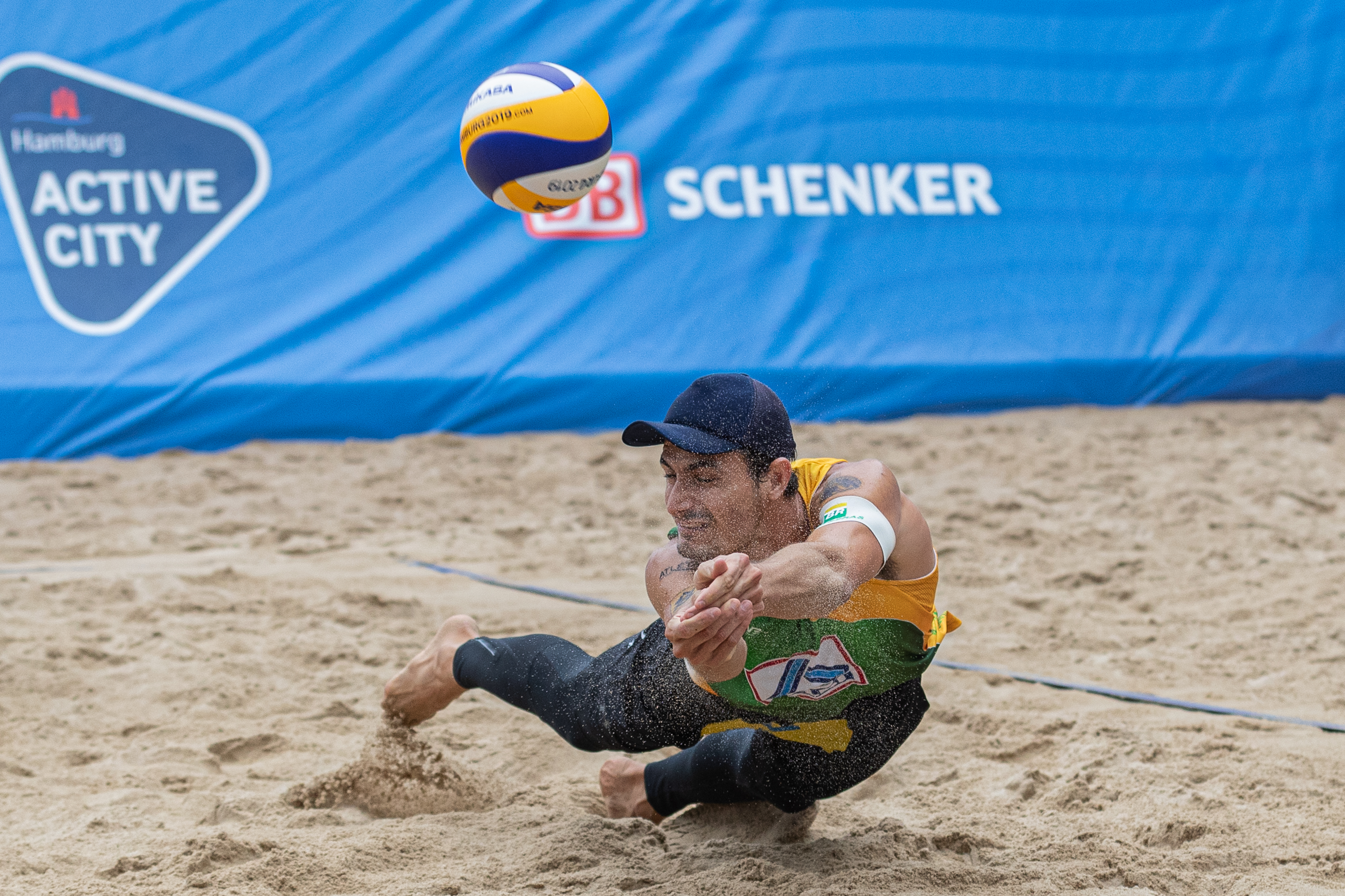 BeachVolleyball Weltmeisterschaft Hamburg 2019; Andre Loyola Stein (BRA, Brasilien)